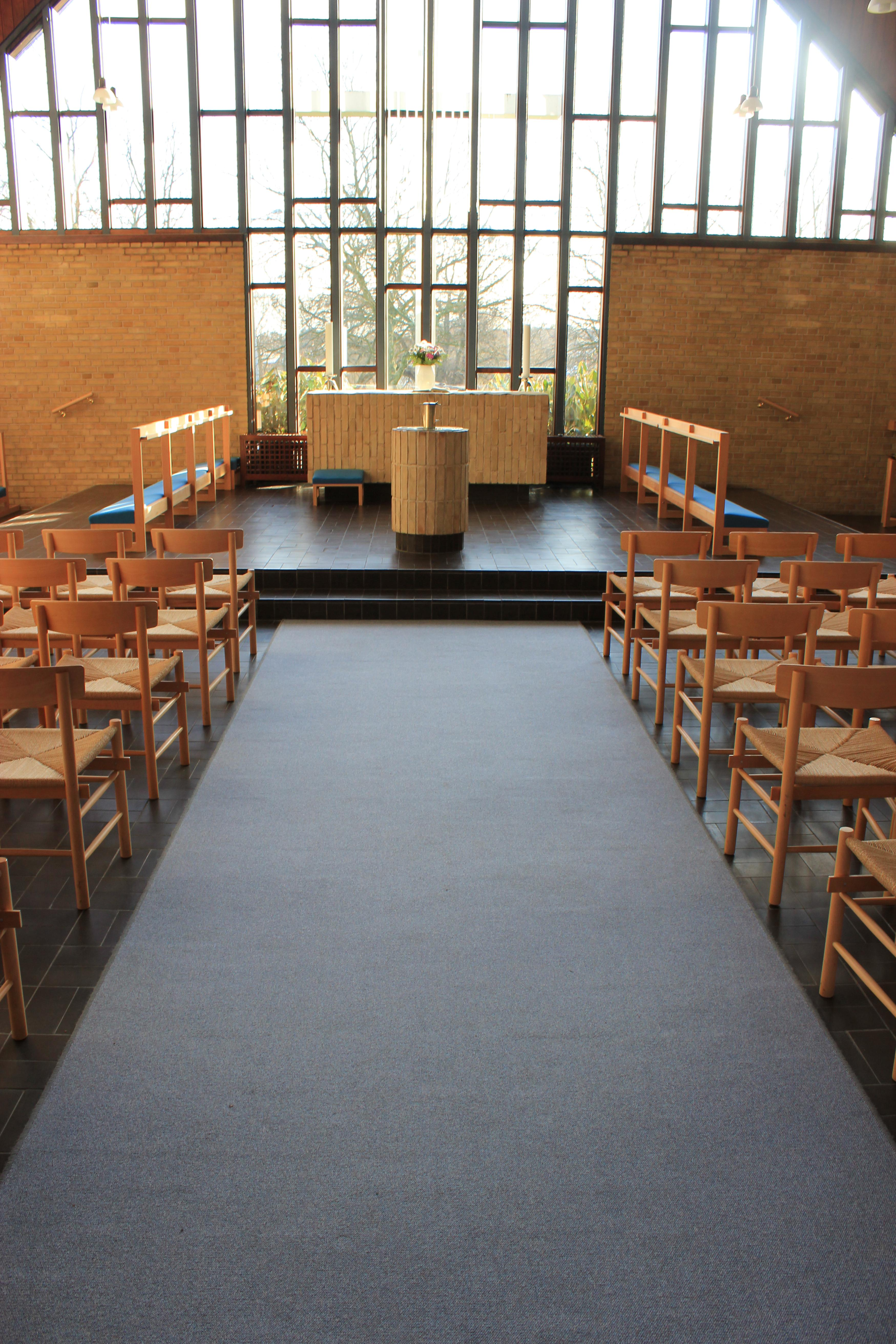 Midtergangen i Husumvold Kirke